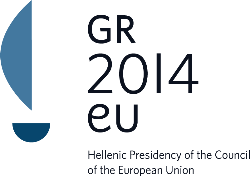 Logo de la présidence Grecque de l'UR 2014